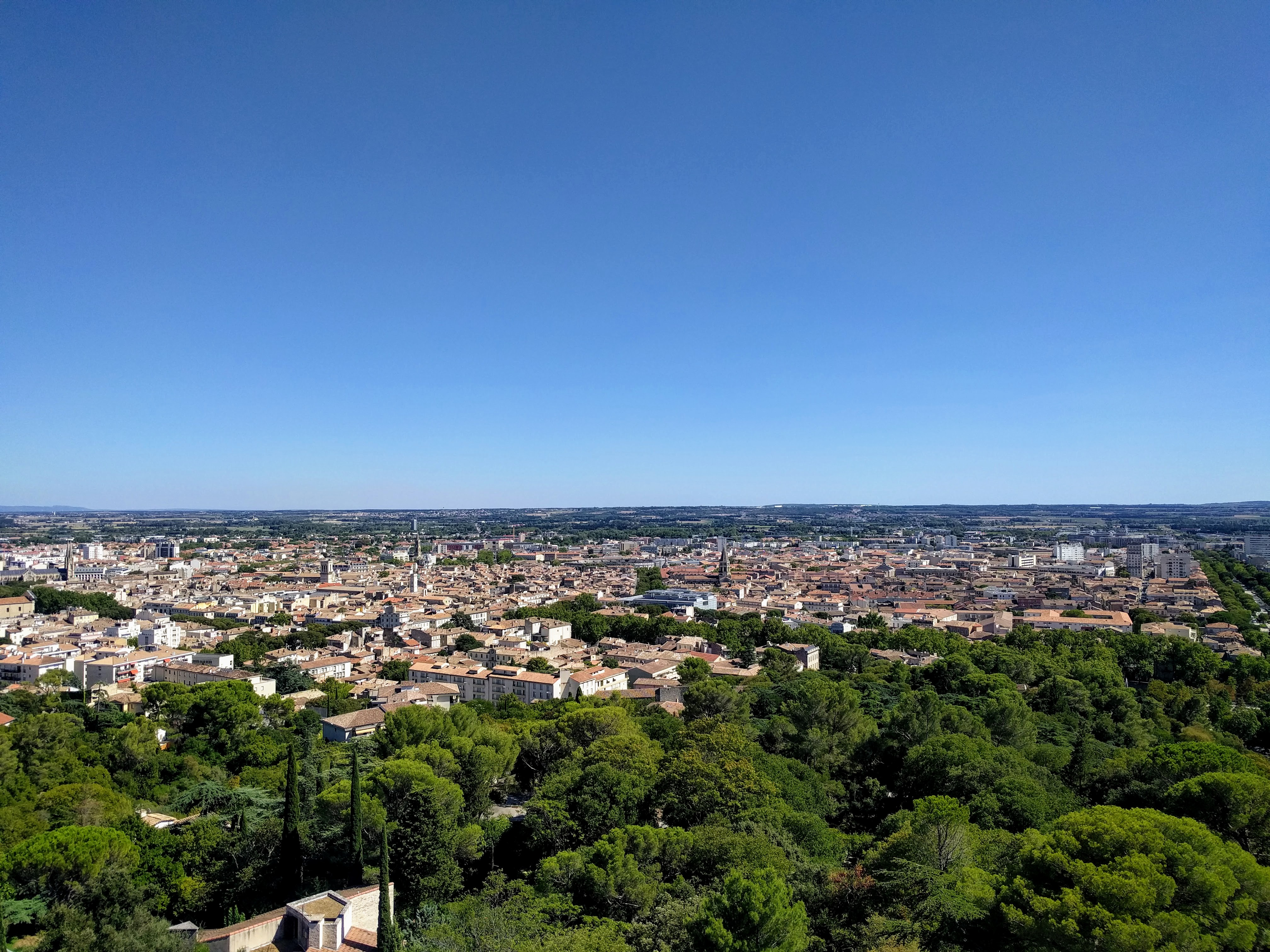 La ville de Nîmes vue depuis le sommet de la Tour Magne, en 2017